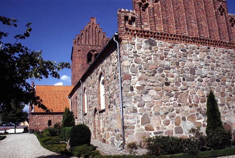 Grevinge Kirke i Danmark. Grevinge kirke